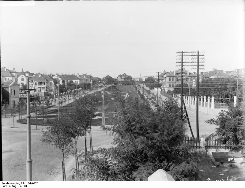 Schutzgebiet Kiautschou Tsingtau : Ausgebaute Albert-Str.